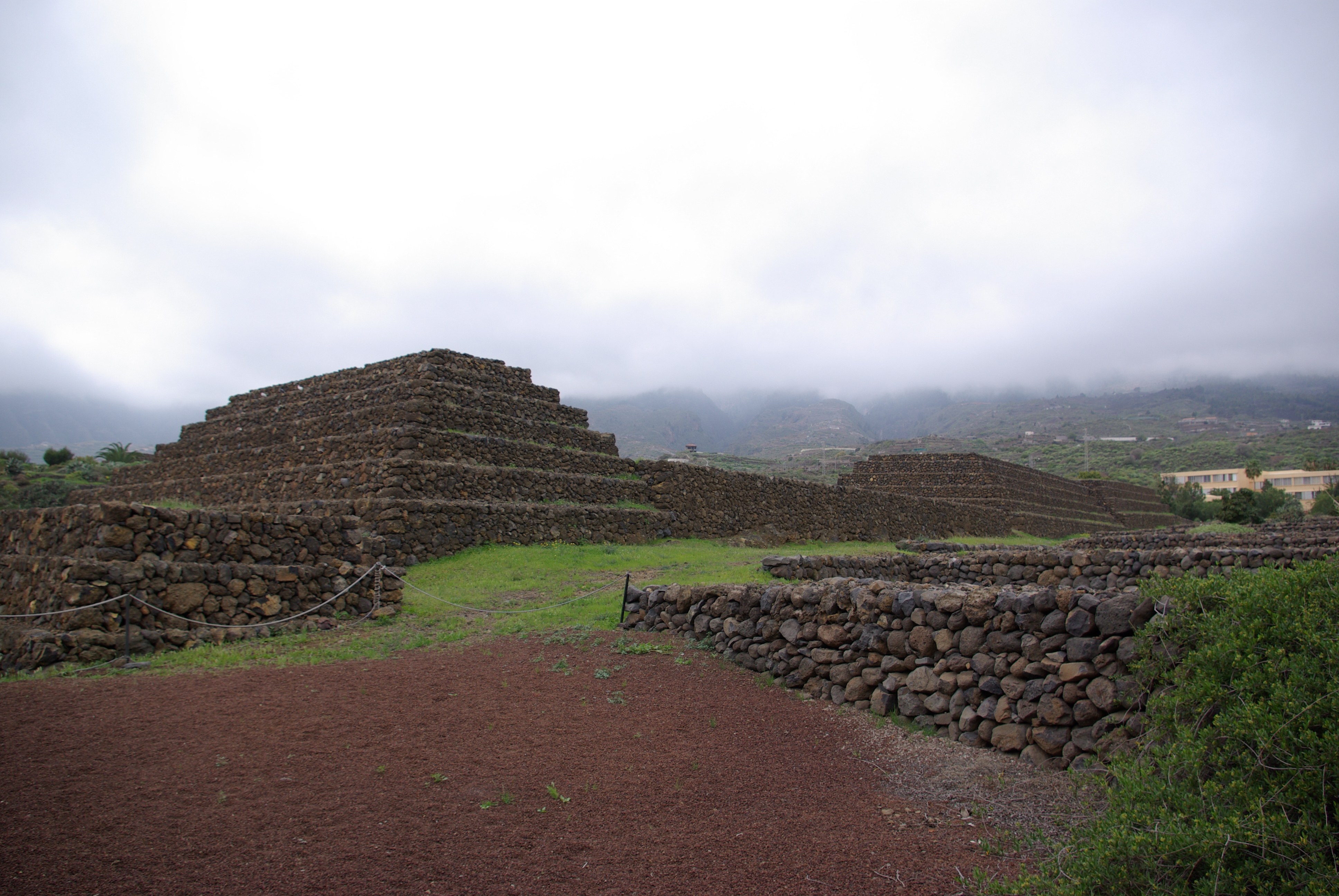 Pyramiden von Güímar, Teneriffa